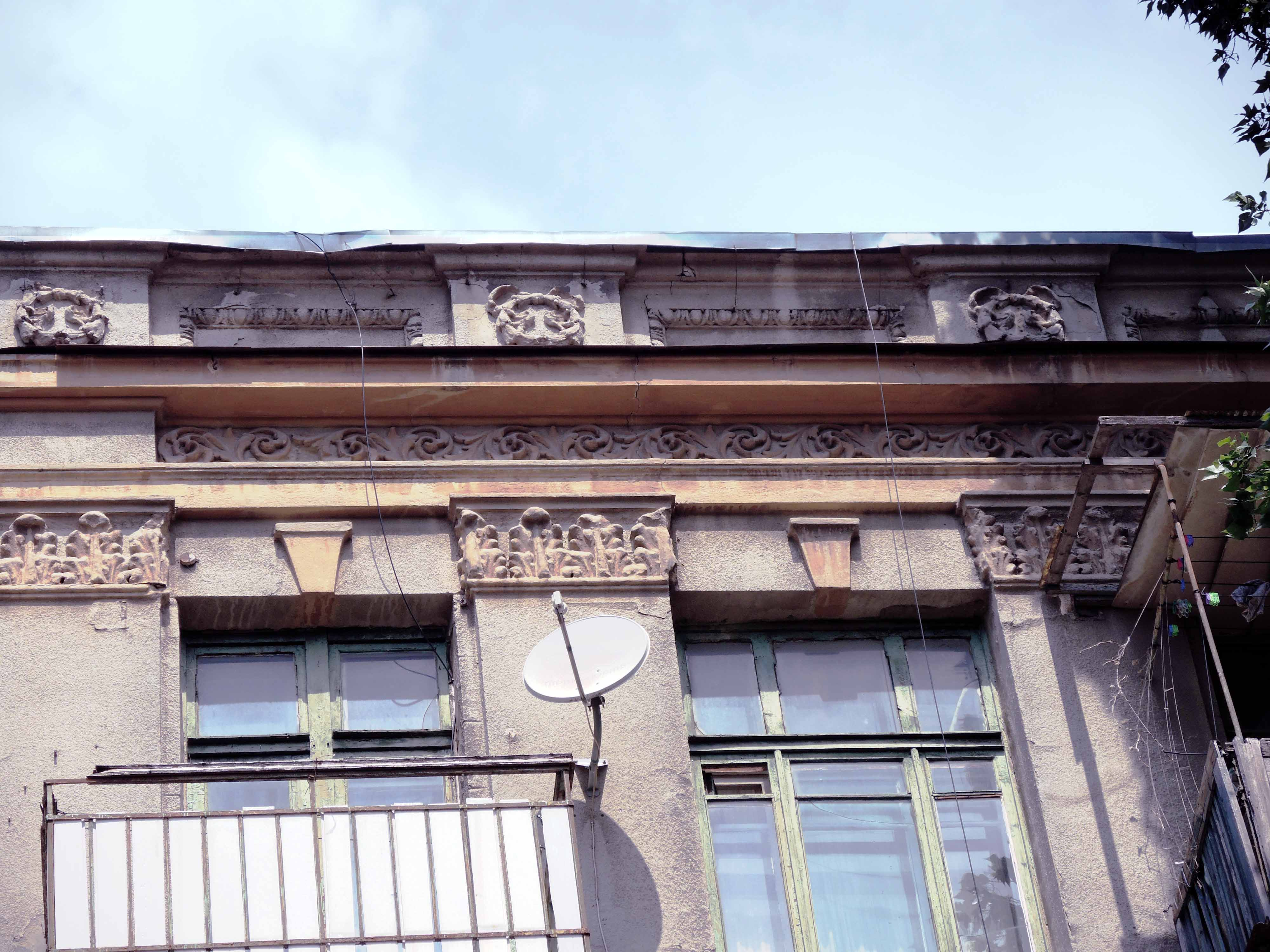 Дом М.Б. Рындзюн, в котором располагалась водолечебница И.Г. Рындзюна: улица Серафимовича, 89/94, улица Социалистическая,, Ростов-на-Дону, Ростовская область